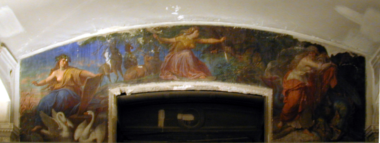 Berlin, Neues Museum - Vaterländischer Saal: Nornen